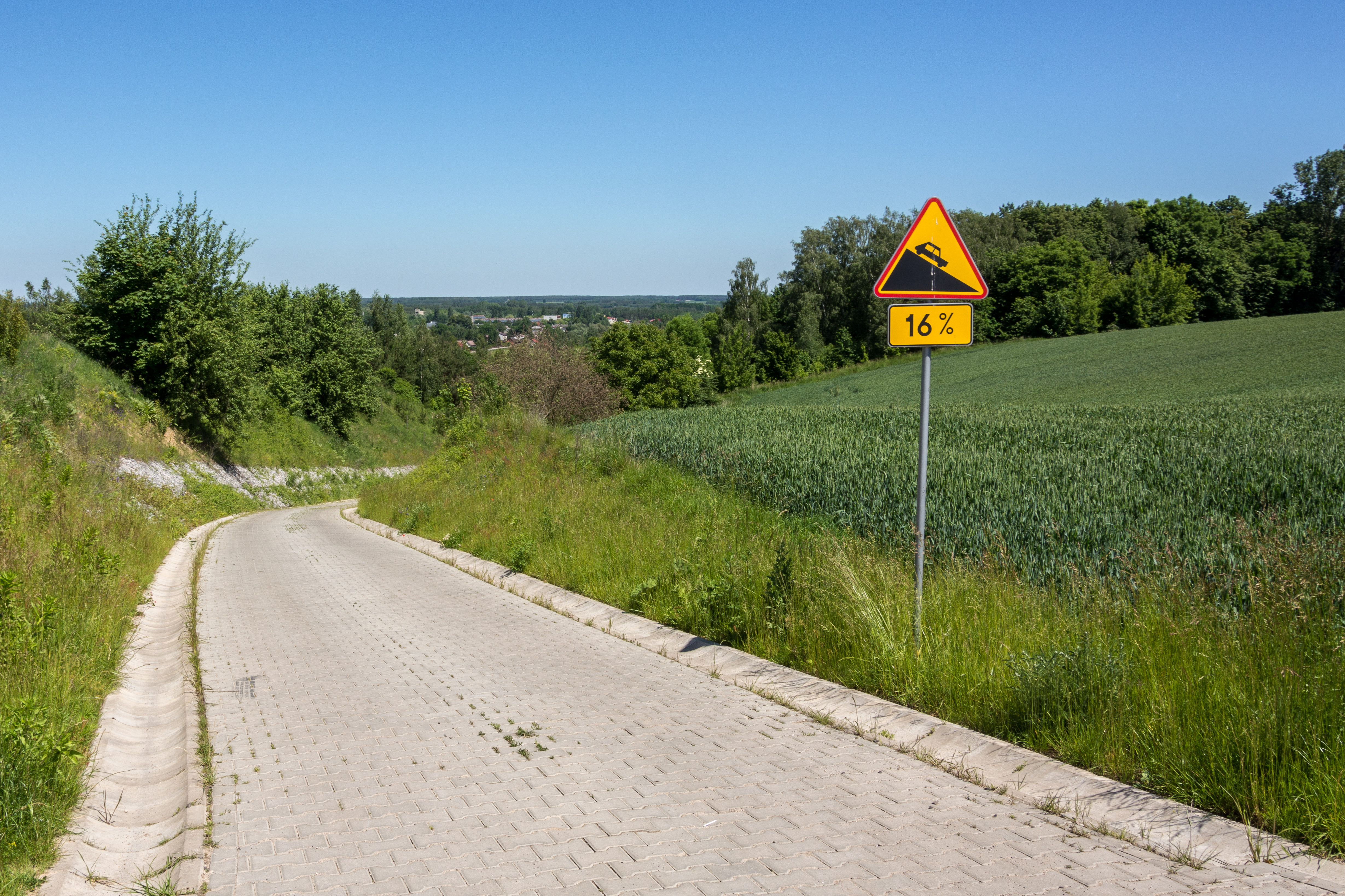 Znak drogowy A-22 z tabliczką T-9. Okolice Iłży.